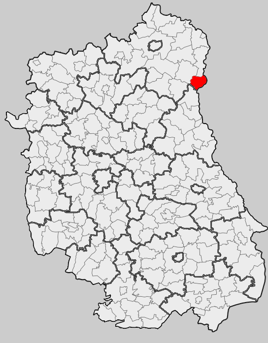 Map of gmina Sławatycze, Biała Podlaska county, Lublin voivodship Mapa gminy Sławatycze, powiat bialski, województwo lubelskie